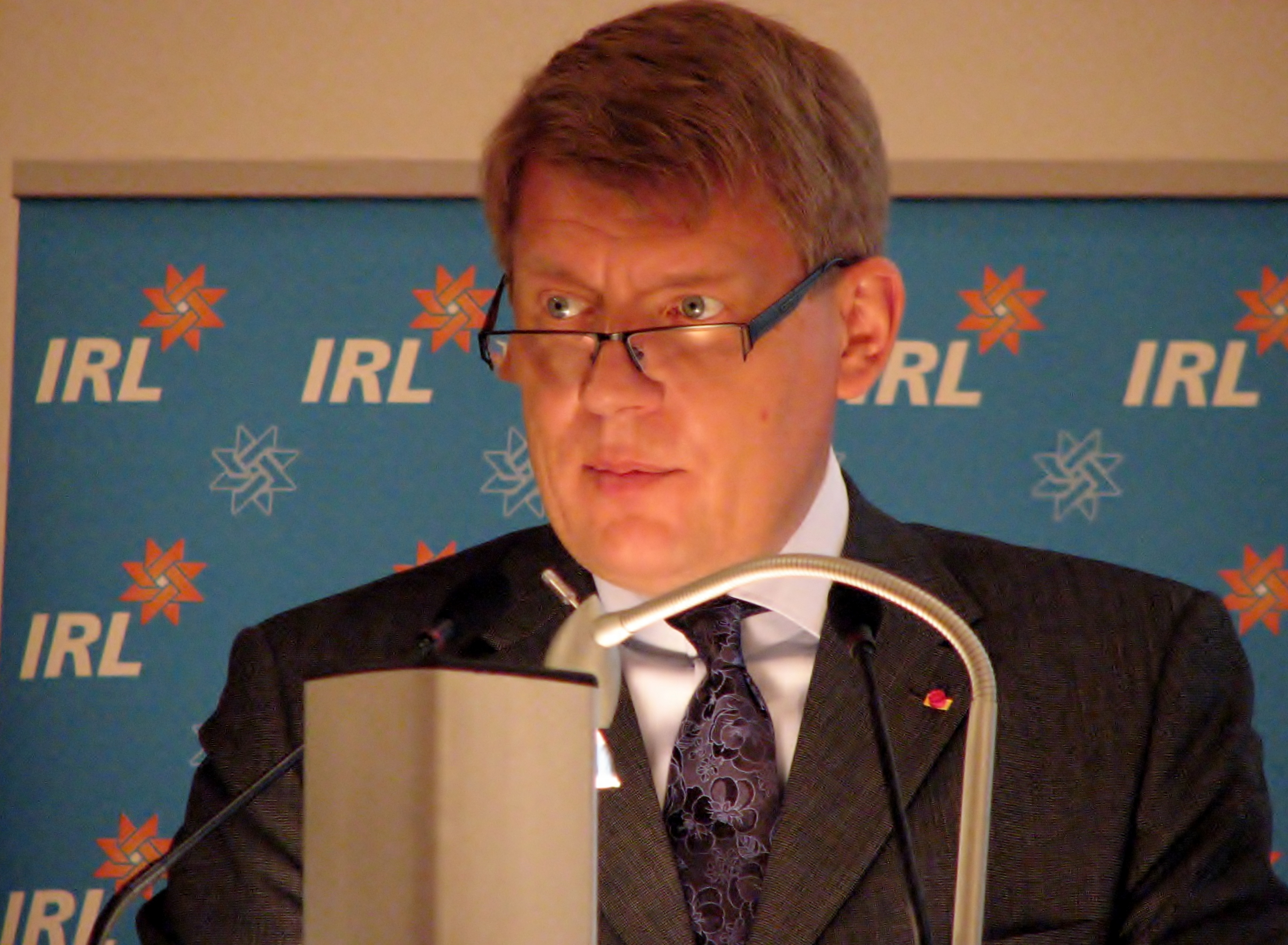 Toomas Luman esinemas IRL-i hariduskonverentsil